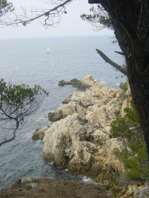 Photo de la calanque